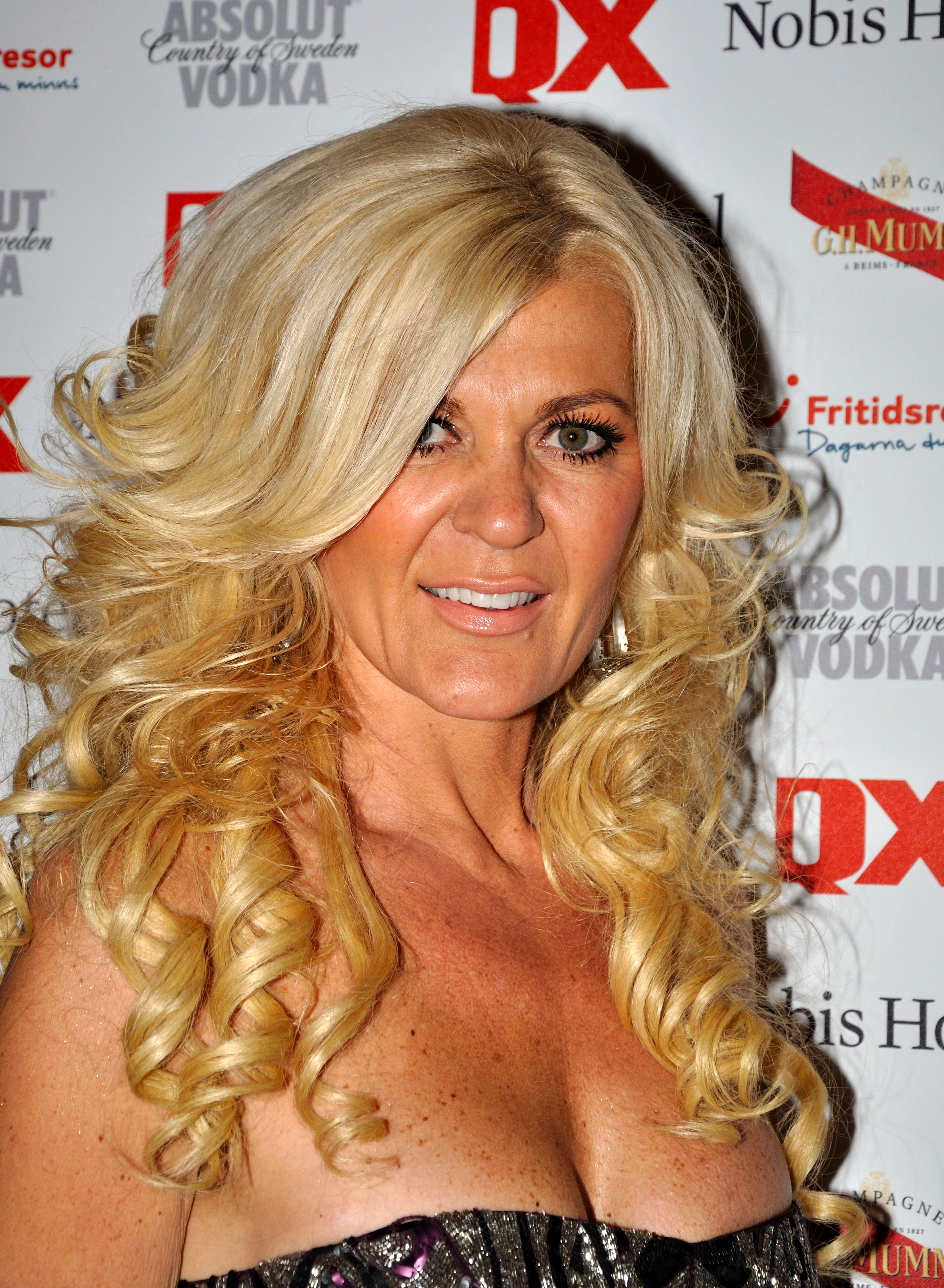 Gaygalan 2011 Maria Montazami